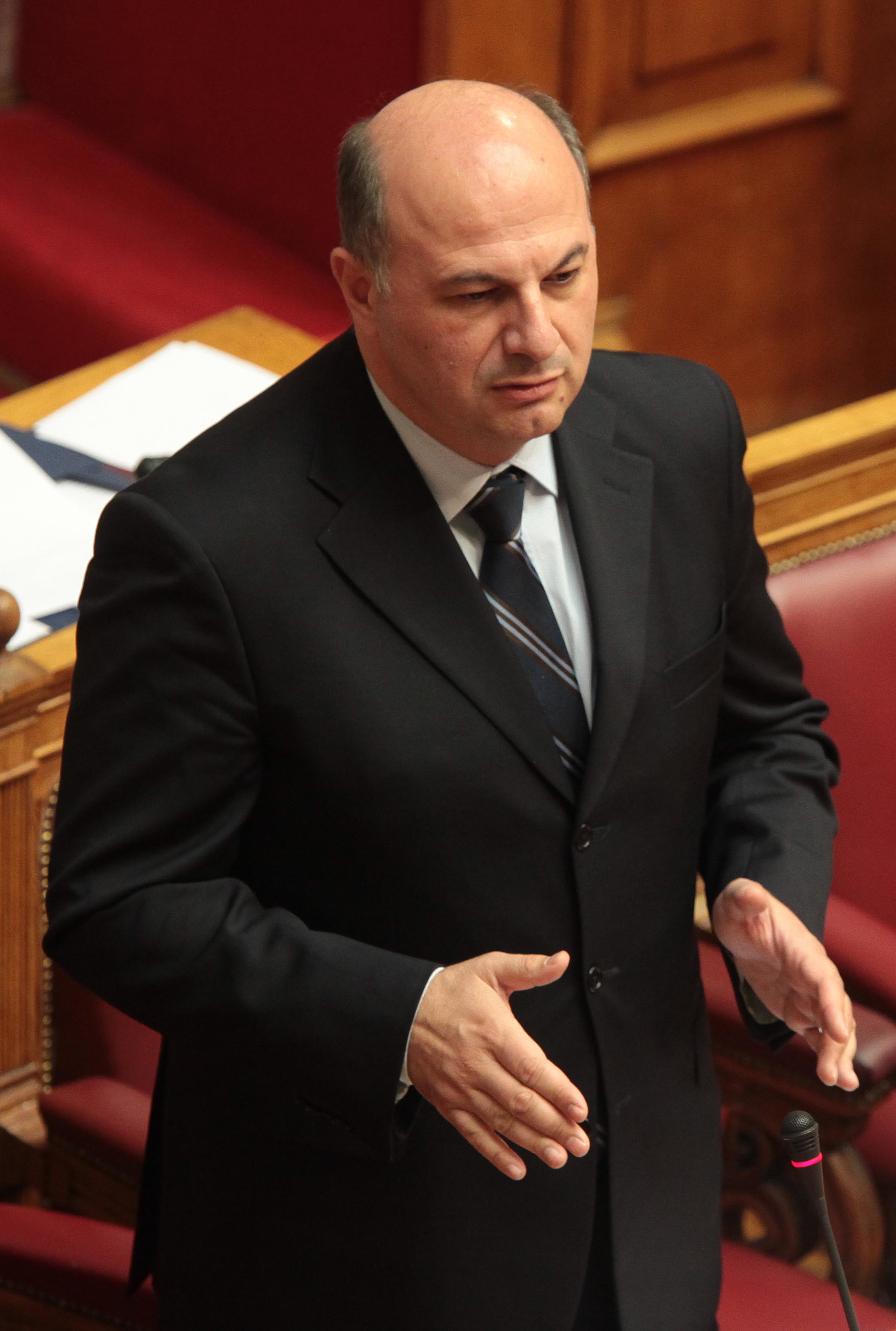 Απάντηση ΥΦΥΠΕΞ Κ. Τσιάρα σε επίκαιρη ερώτηση της Χρυσής Αυγής